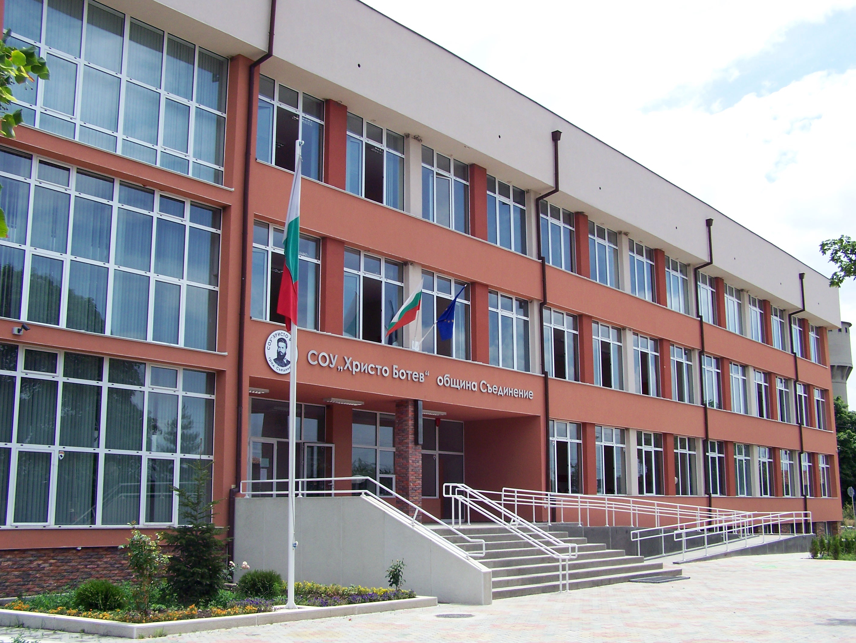 СОУ"Христо Ботев" гр. Съединение - централна сграда